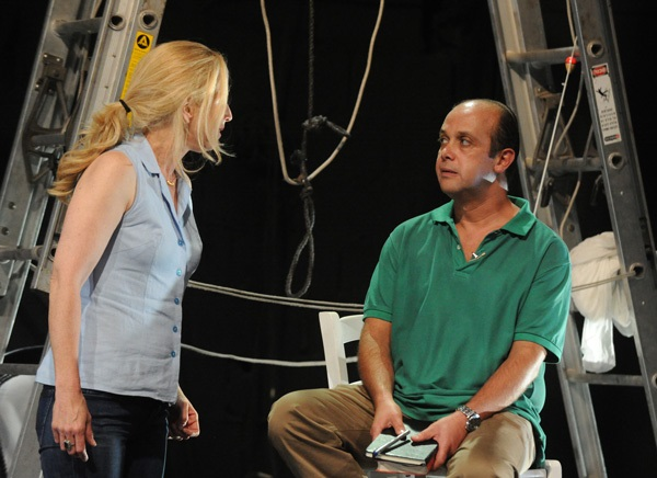 דודו ניב עם שירי גולן - השחף, 2013